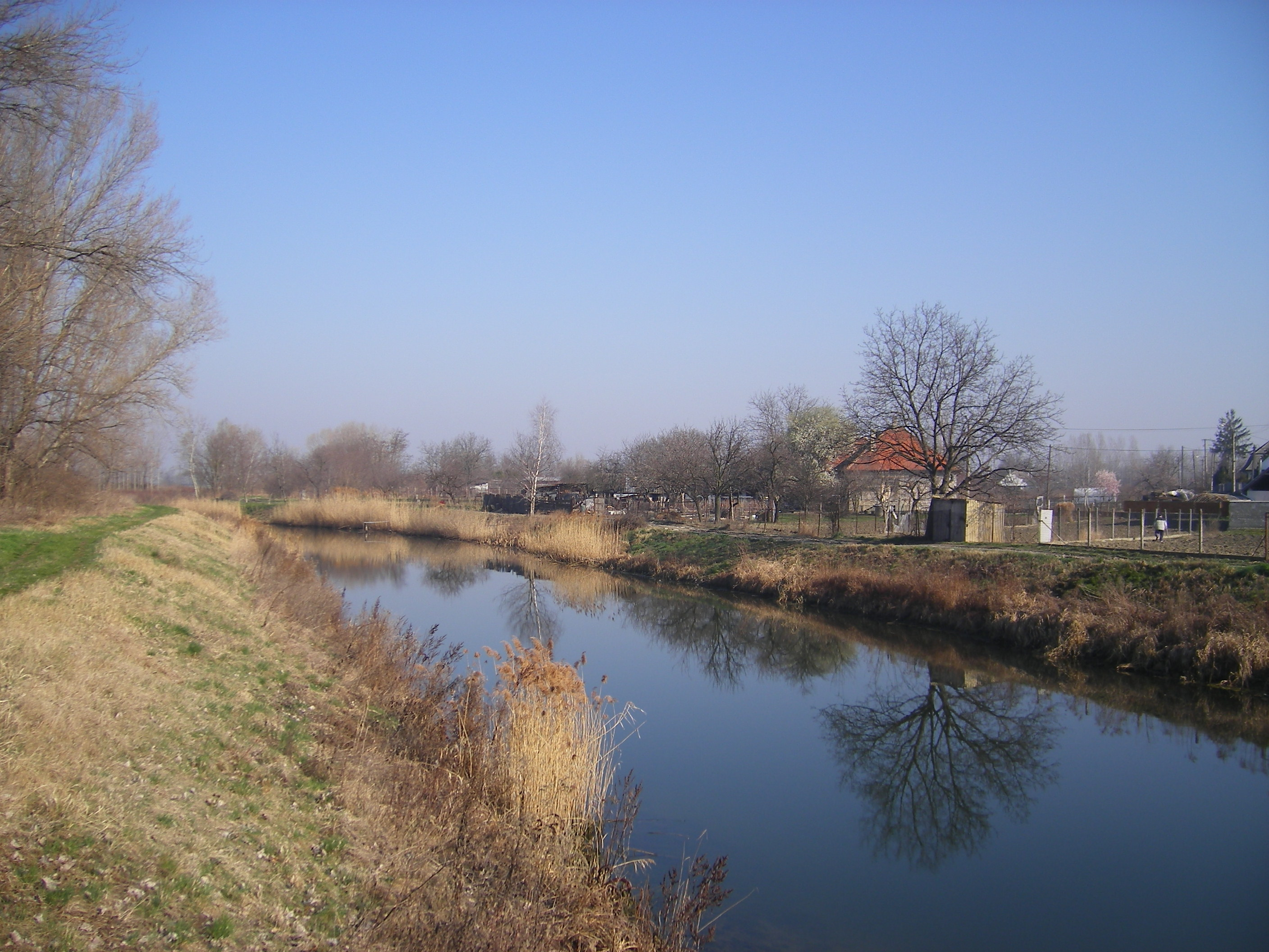 Nagykeszi - Gellér-Nagykeszi-kanális